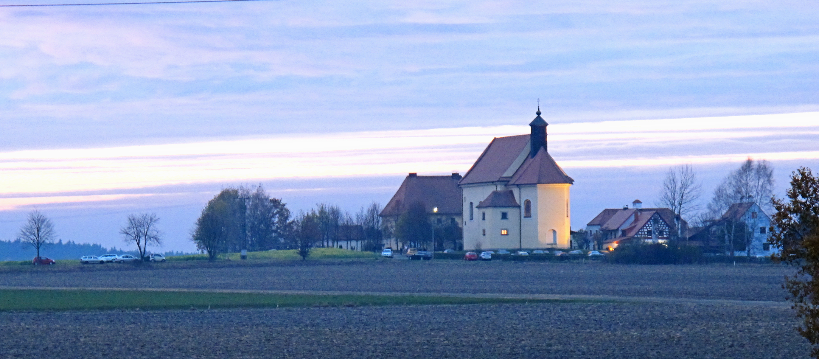 Deutschland, Bayern, Regierungsbezirk Oberpfalz, Landkreis Tirschenreuth, Gemeinde Neualbenreuth, Ort Ottengrün, Wallfahrtskirche "Kleine Kappl"